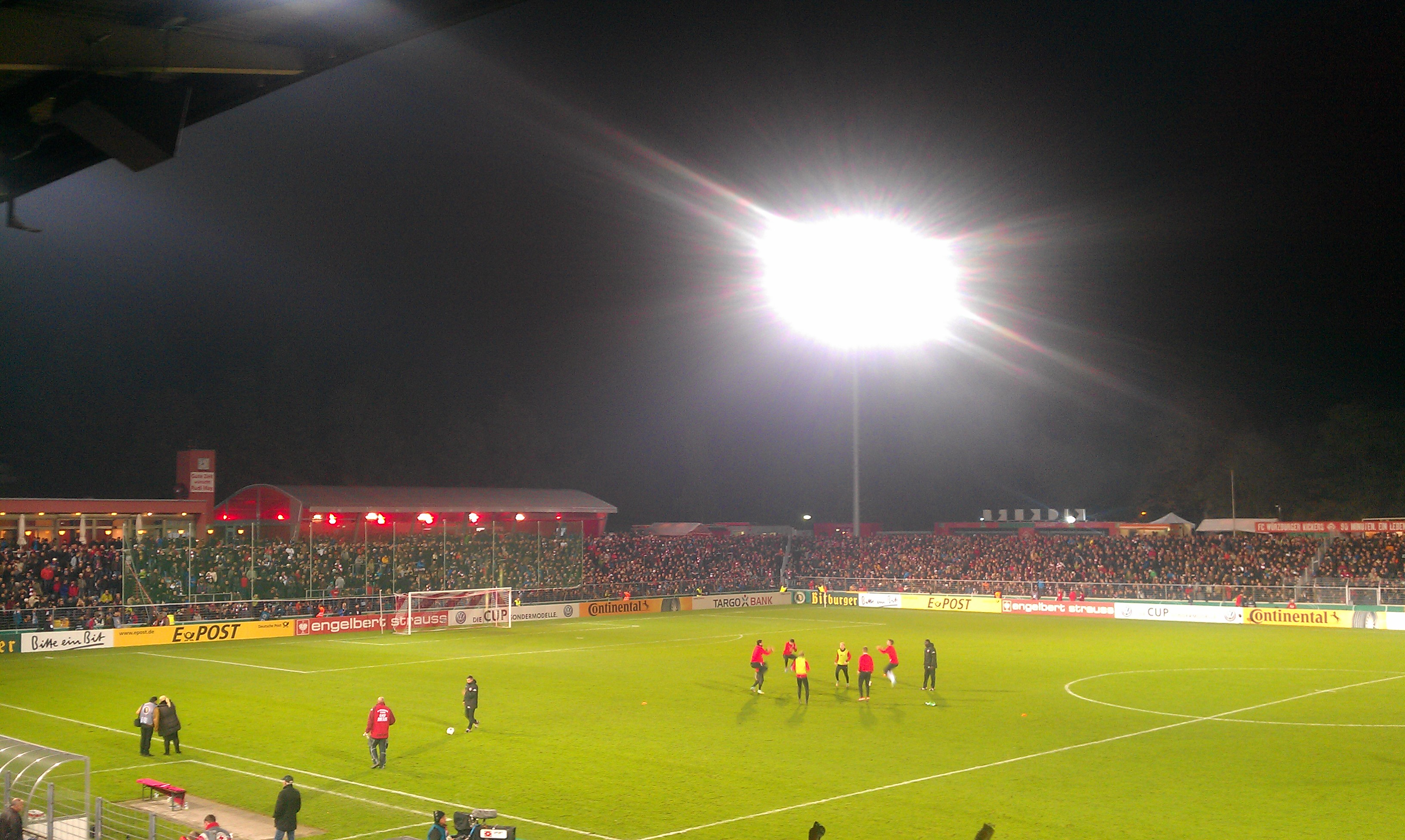 Die voll besetzte Flyeralarm-Arena (Blick auf Gegengerade und Nord-West-Seite) beim Pokalspiel Würzburger Kickers gegen Eintracht Braunschweig unter Flutlicht